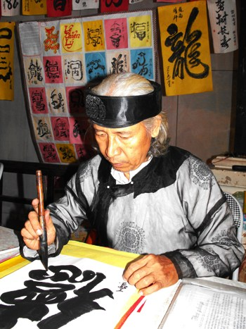 Ảnh chụp nhà thư pháp Lê Thiên Lý